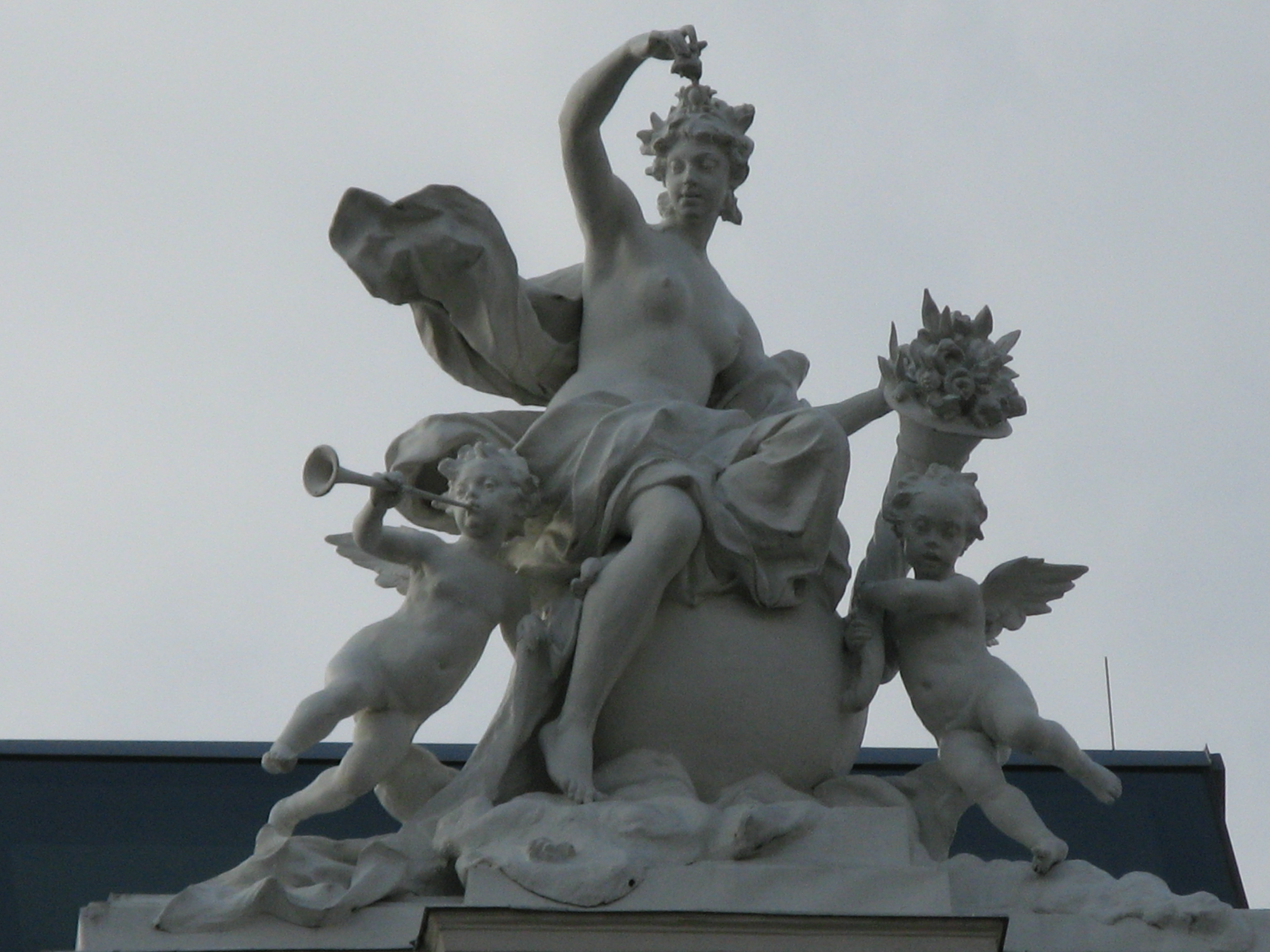 Fortuna mit Putten, Schottengasse 1, Wien-Innere Stadt